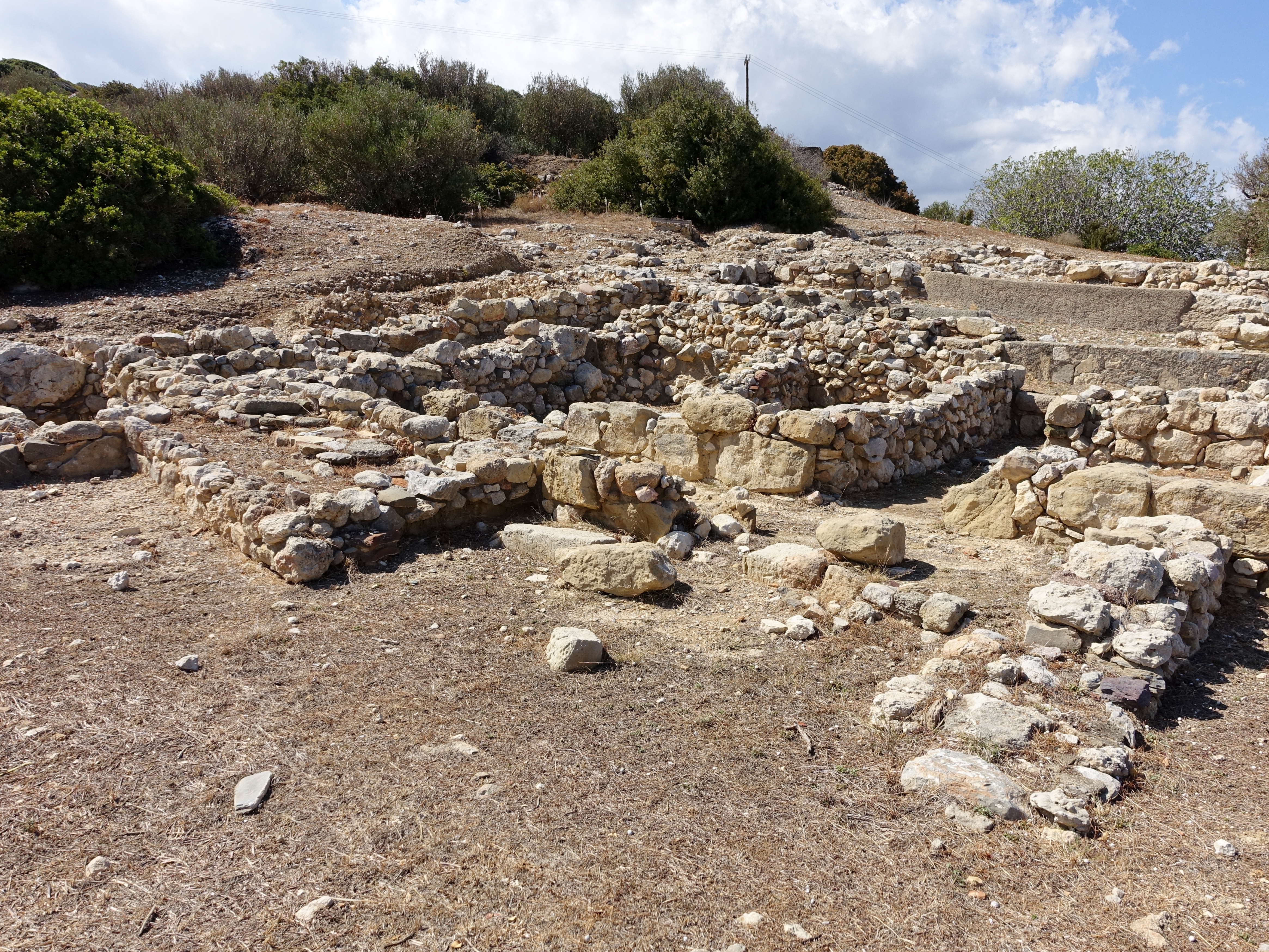 Minoische Ausgrabungsstätte von Petras (Πετράς), Gemeinde Sitia, Kreta, Griechenland